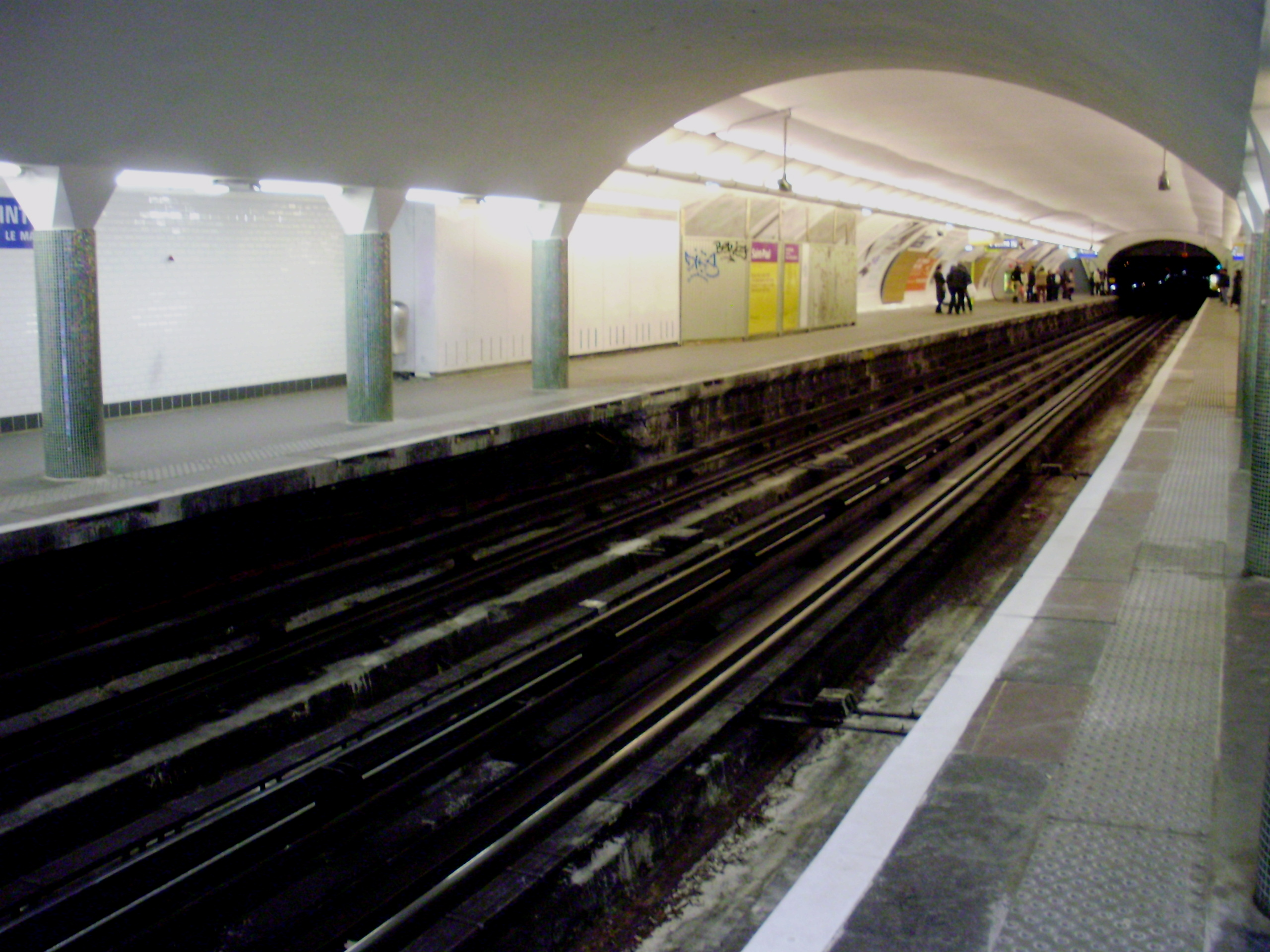 Quais de la station « Saint-Paul » (ligne 1) du métro de Paris